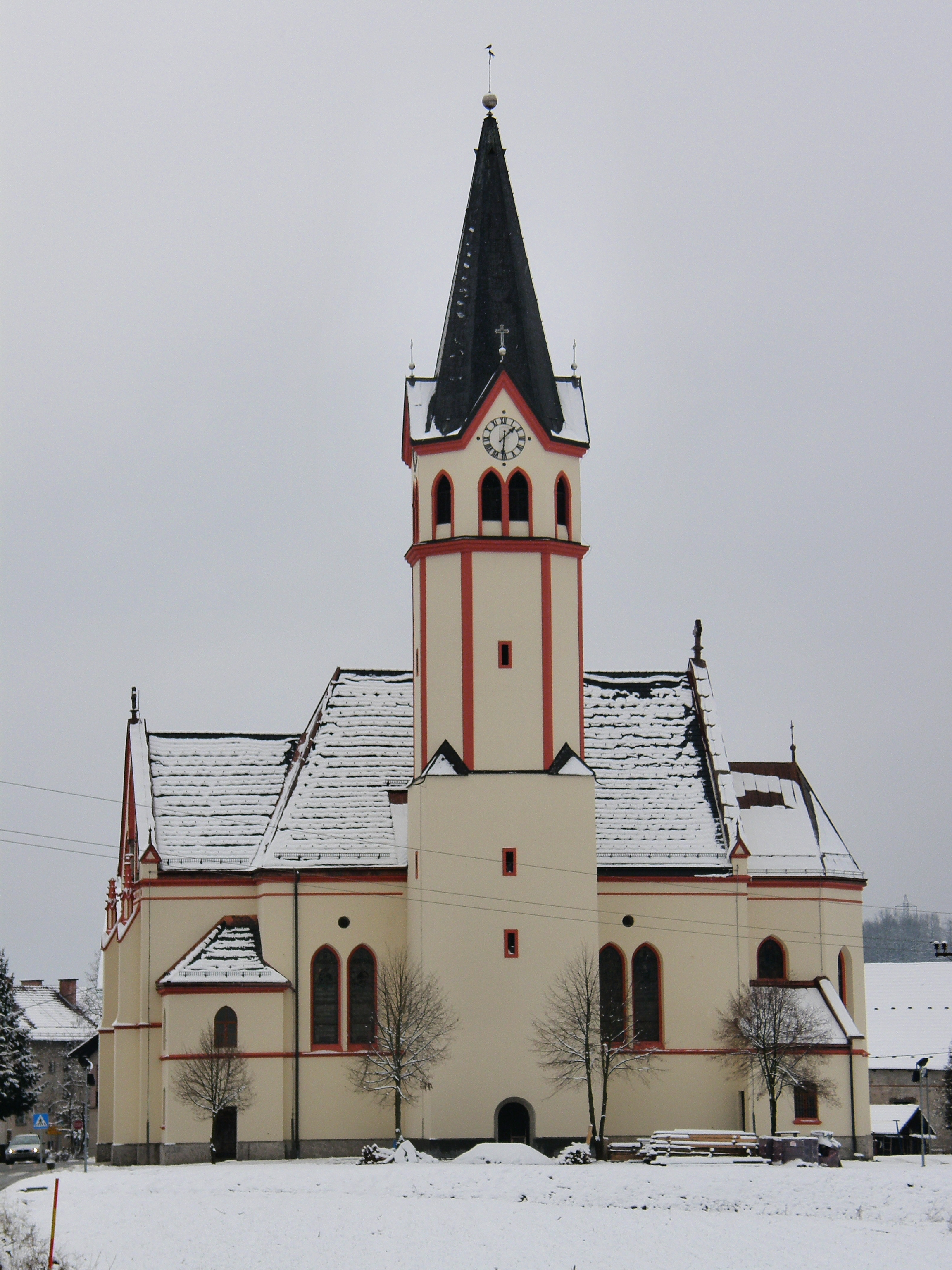 Cerkev sv. Kancijana v Mirni Peči.